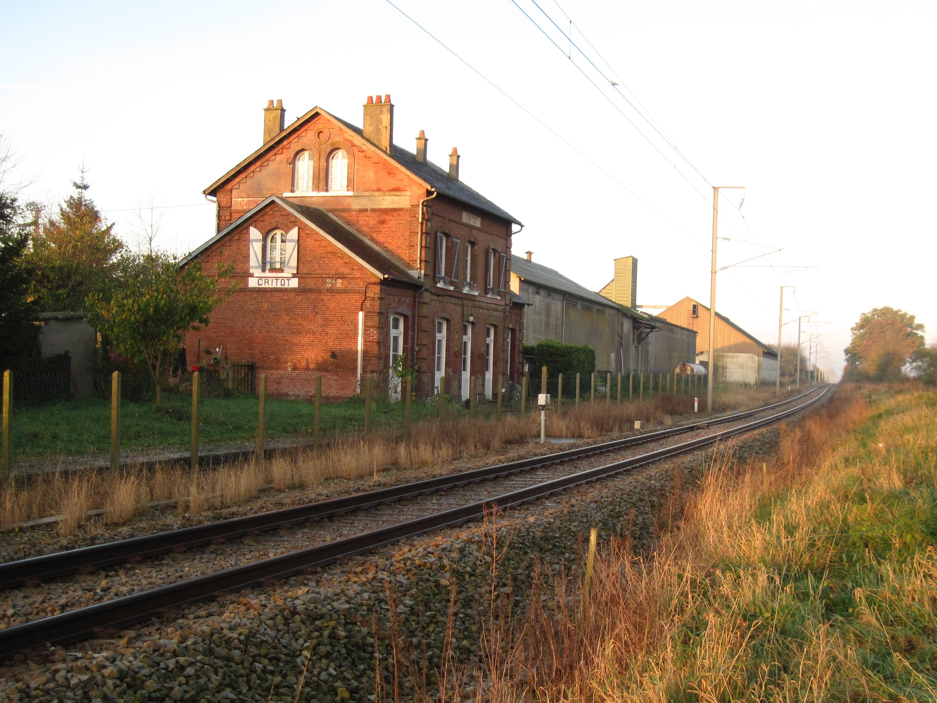 La gare de Critot, aujourd'hui désaffectée.